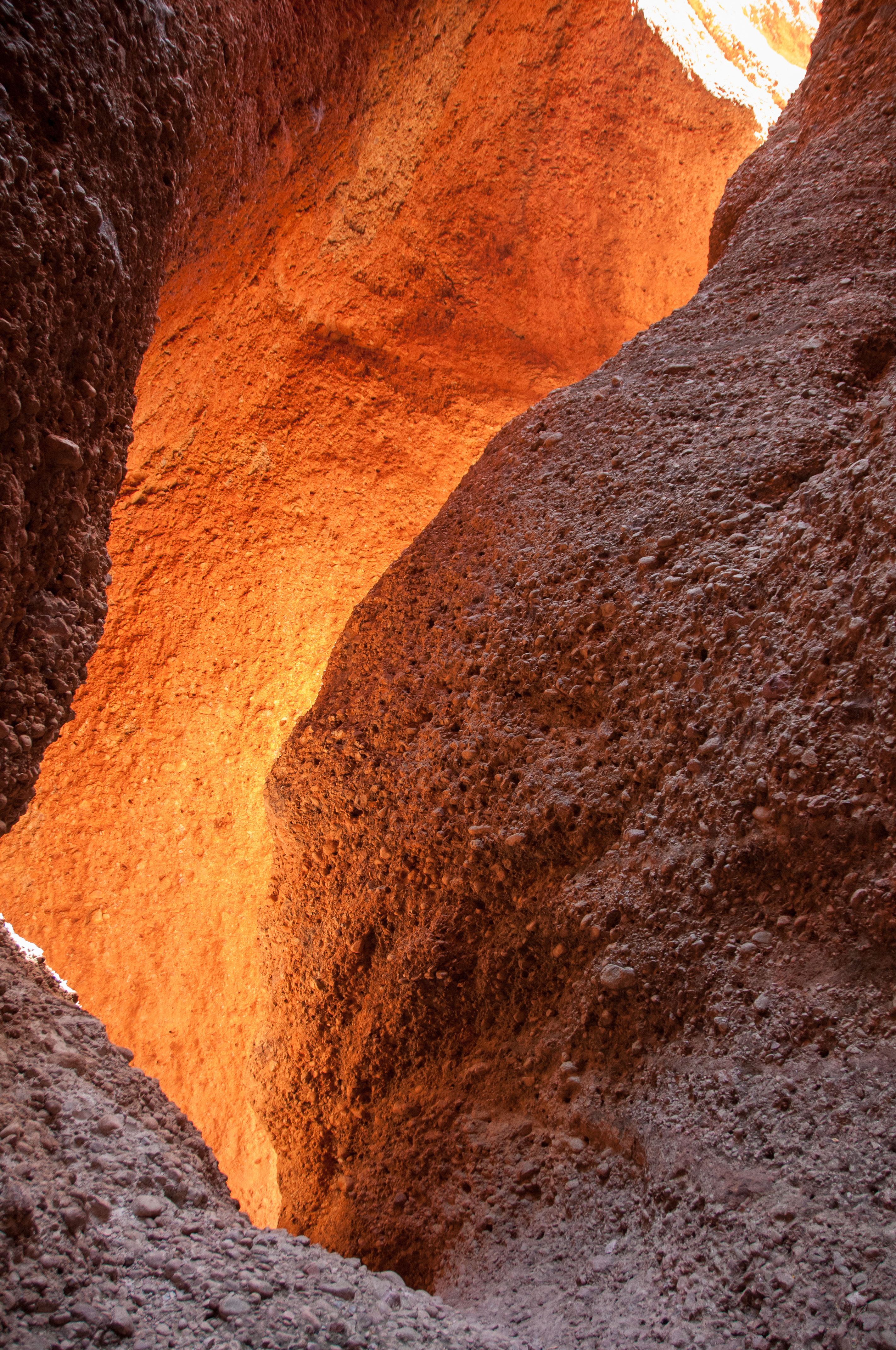 In the Bungle Bungles